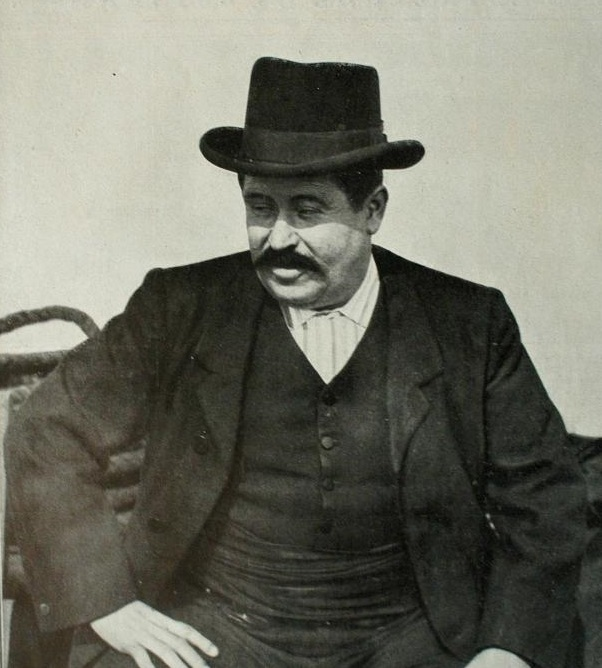 Joaquín Camargo «El Vivillo», 1911